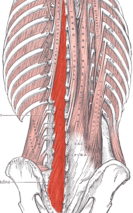 Musculi multifidi